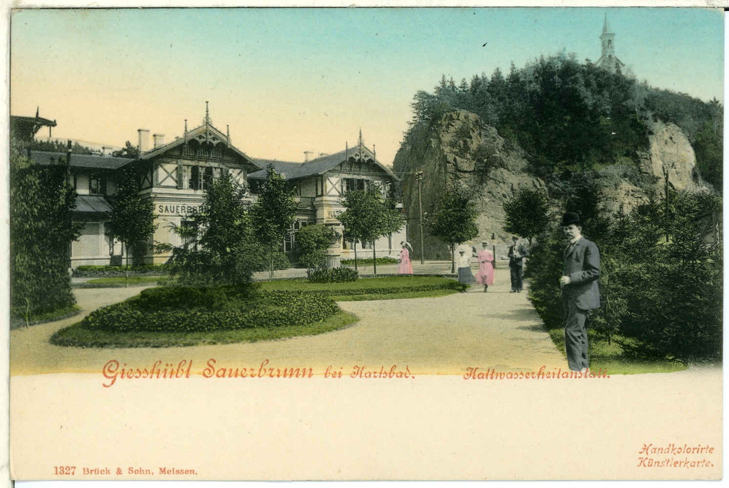 Gießhübl-Sauerbrunn; Kaltwasserheilanstalt This postcard is from publisher Brück & Sohn in Meißen ( This postcard has a unique number 01327 and is available in a higher resolution at the publisher. This images was uploaded in a cooperation project between Wikipedians and the publisher.